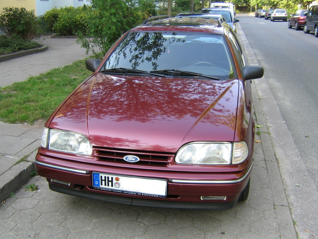 Ford Scorpio Turnier Modell 1992